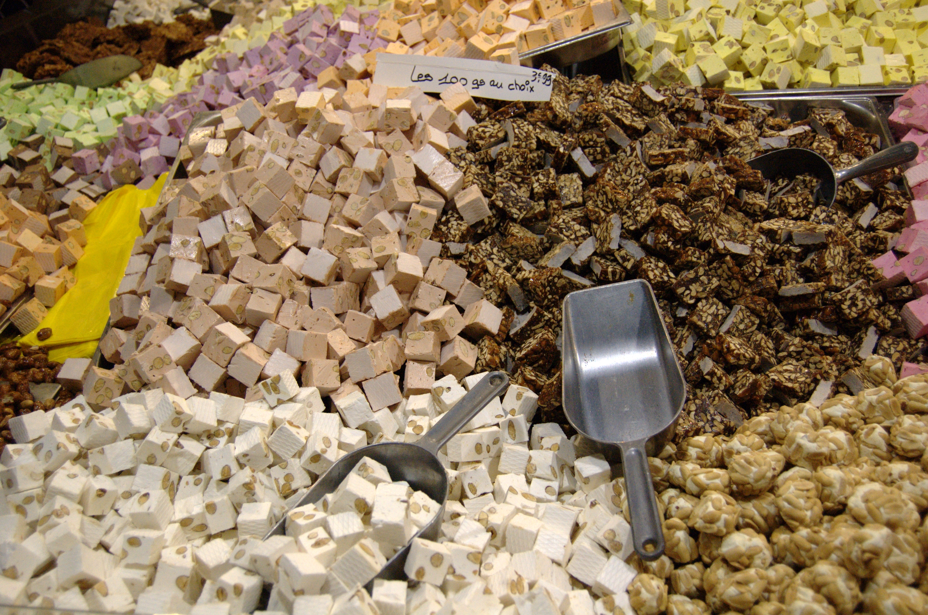 Nougats - Salon international de l'agriculture 2009 - Paris - France - 22 février 2009.